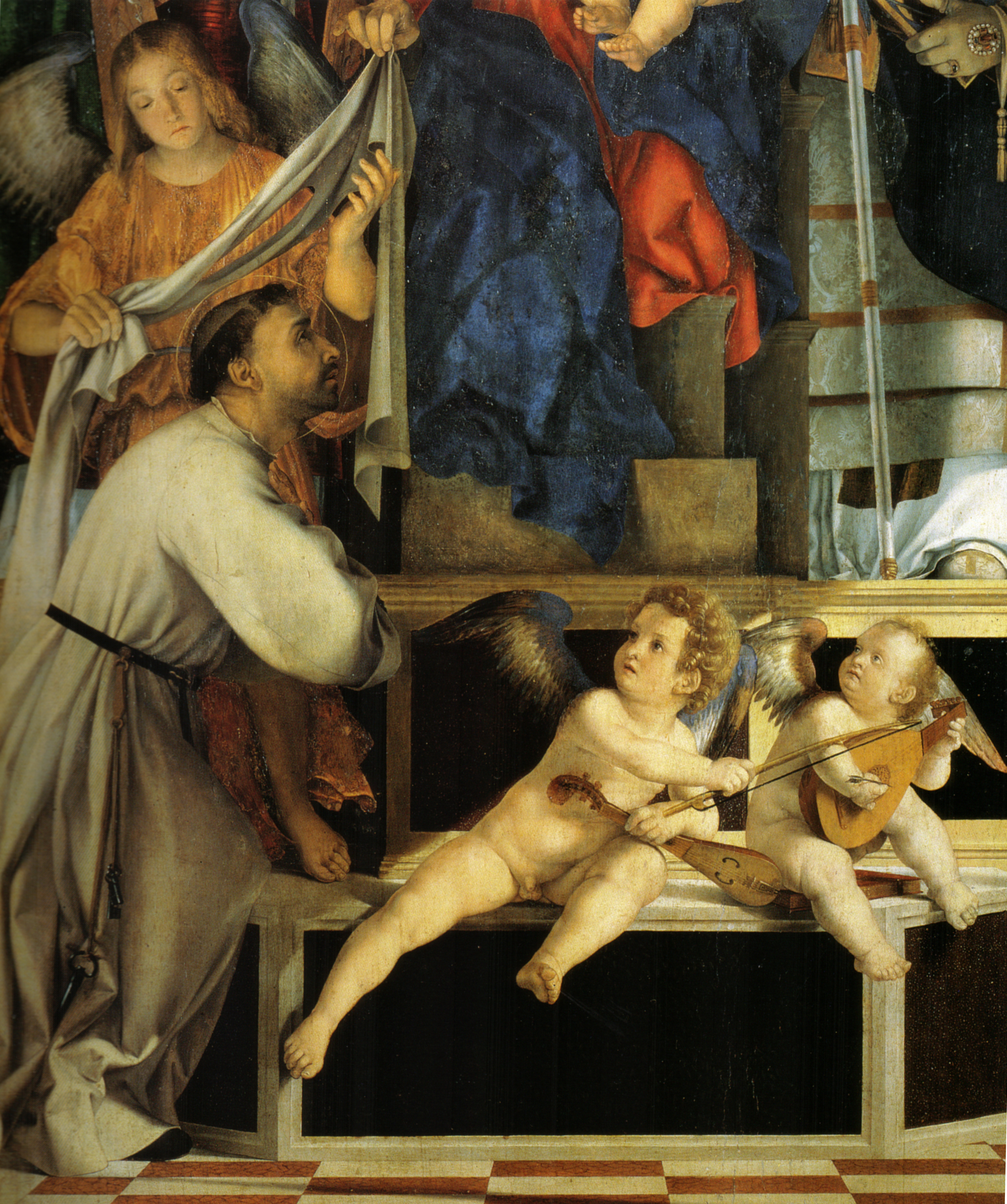 Recanati Altarpiece detail